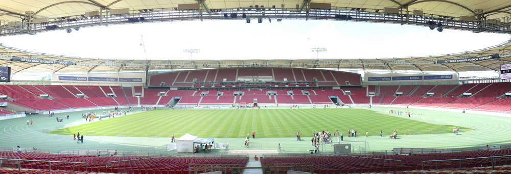 Stuttgart Gottlieb-Daimler-Stadion am Tag der offenen Tür 2007